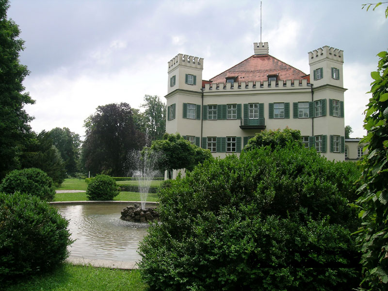 zámeček Possenhoffen u štemberského jezera